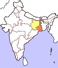 Lok Sabha 1998. Gjord av Soman.